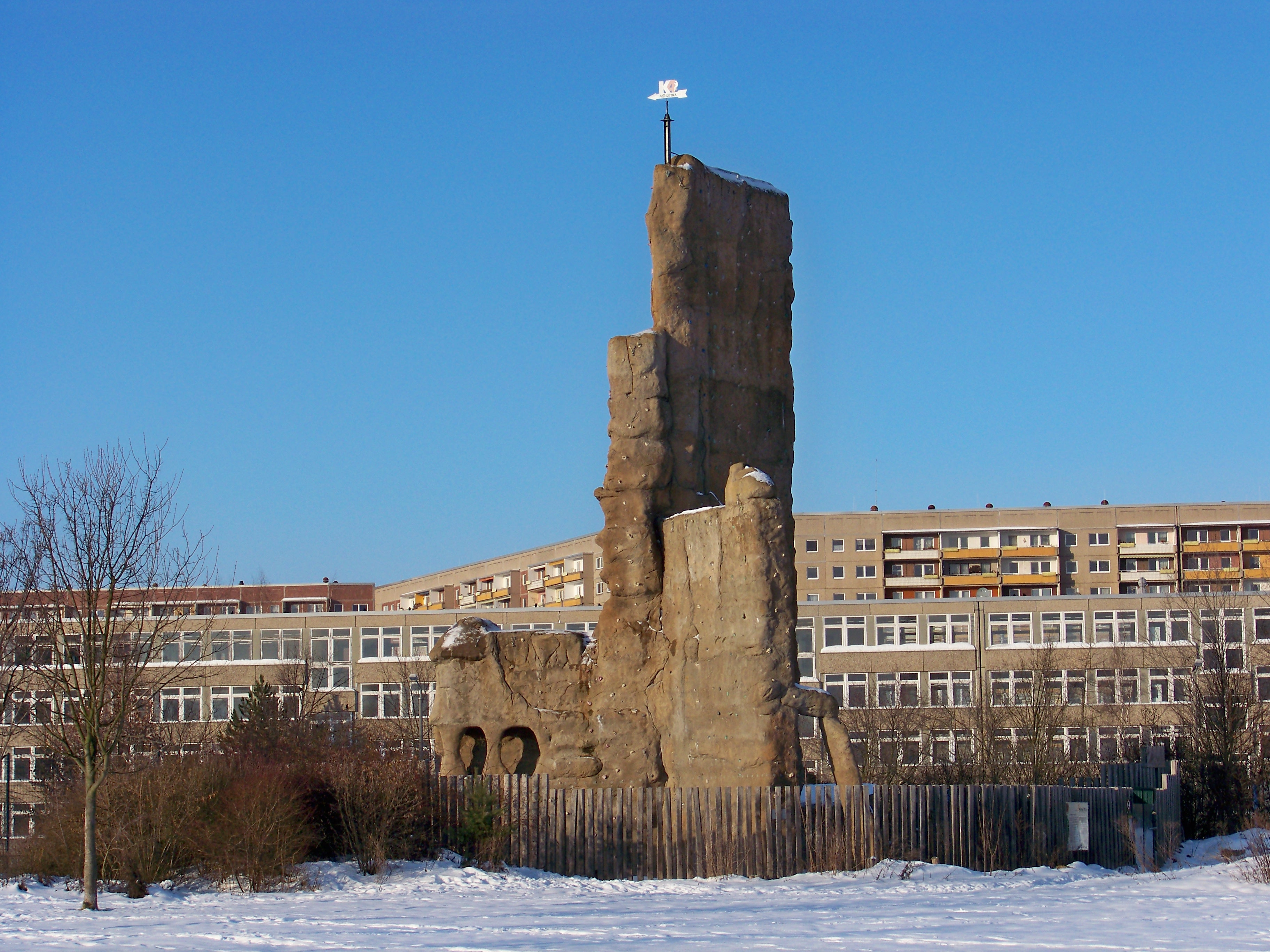 Kletterfelsen K4 im Leipziger Plattenbaugebiet Grünau von Süden gesehen, im Hintergrund Plattenbauten eines Schulbautyps und vom Typ WBS 70